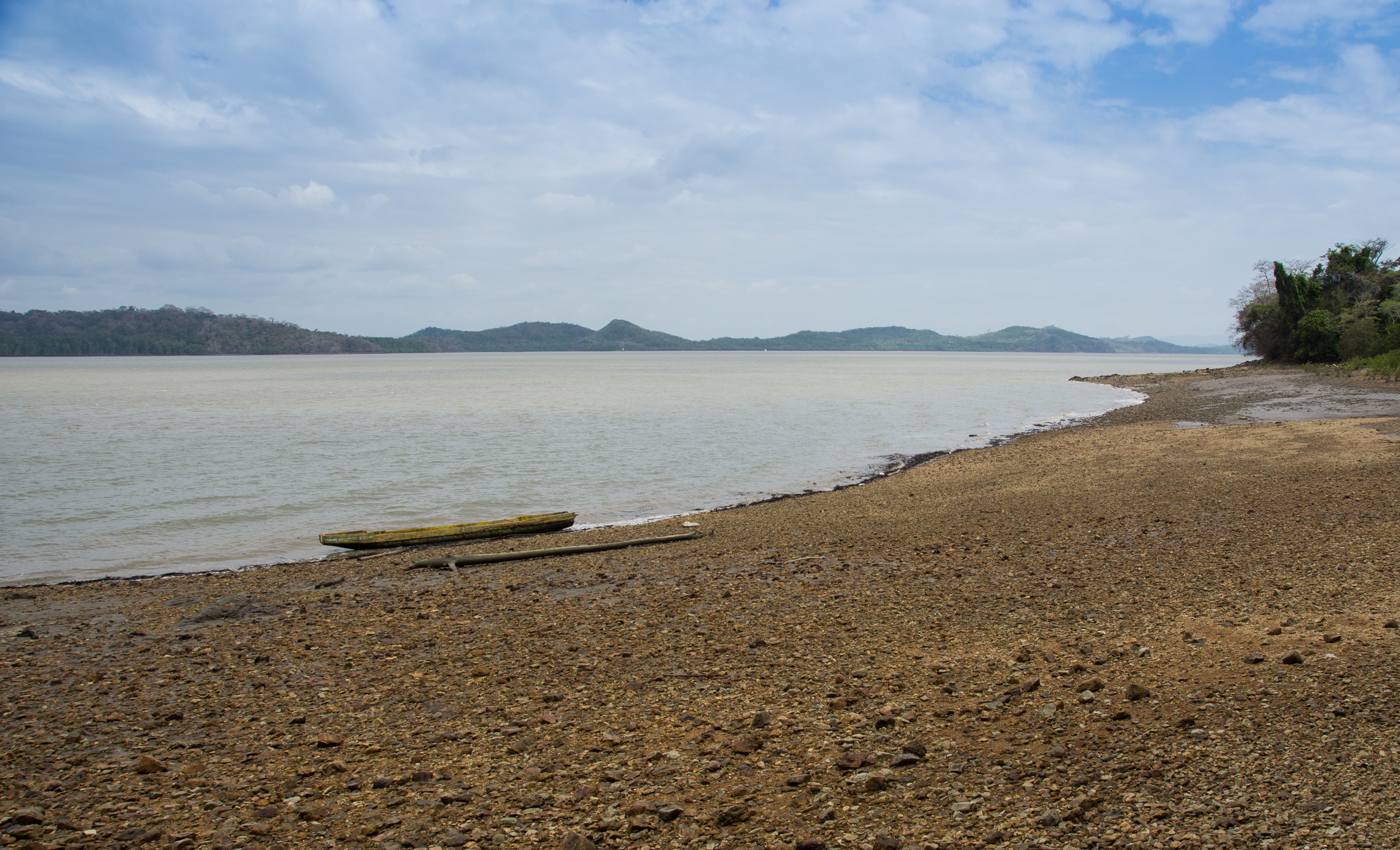 Playa de Buena Vista, lugar de la primera toma de posesión del Mar del Sur por Balboa en 1513. Aproximadamente en 8º23´N, 78º14´ O.